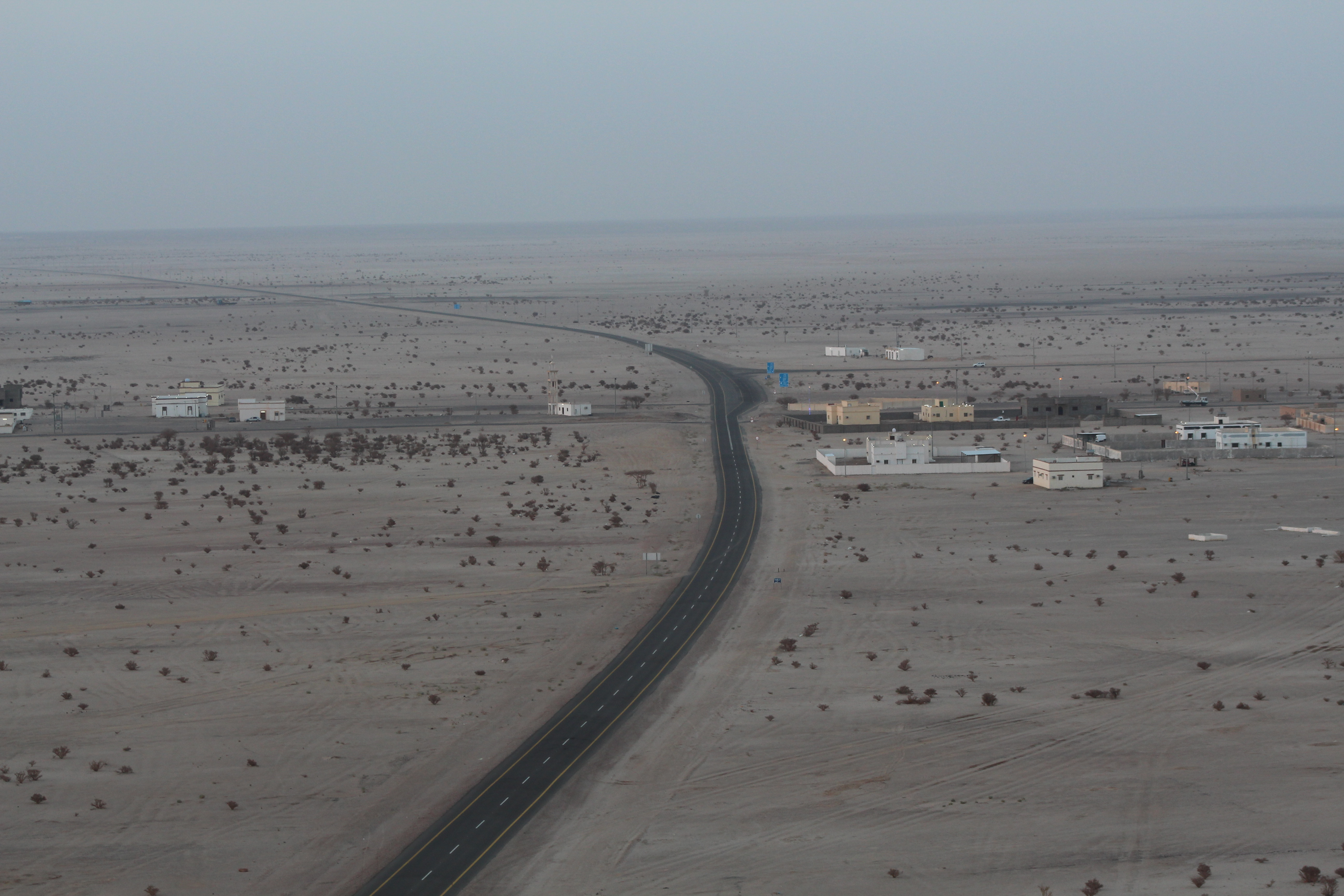 تصوير لمركز الرويلية الصهلوج